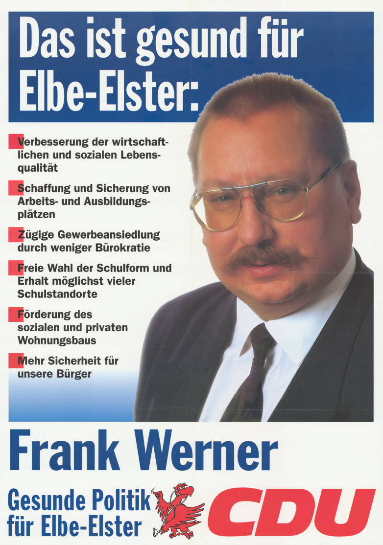 Das ist gesund für Elbe-Elster: . Verbesserung der wirtschaftlichen und sozialen Lebensqualität . Schaffung und Sicherung von Arbeits- und Ausbildungsplätzen . Zügige Gewerbeansiedlung durch weniger Bürokratie . Freie Wahl der Schulform und Erhalt möglichst vieler Schulstandorte . Förderung des sozialen und privaten Wohnungsbaus . Mehr Sicherheit für unsere Bürger Frank Werner Gesunde Politik für Elbe-Elster CDUAbbildung:PorträtfotoPlakatart:Kandidaten-/Personenplakat mit PorträtObjekt-Signatur:10-033 : 227Bestand:Landtagswahlplakate Brandenburg (10-033)GliederungBestand10-18:Landtagswahlplakate Brandenburg (10-033) » CDULizenz:KAS/ACDP 10-033 : 227 CC-BY-SA 3.0 DE